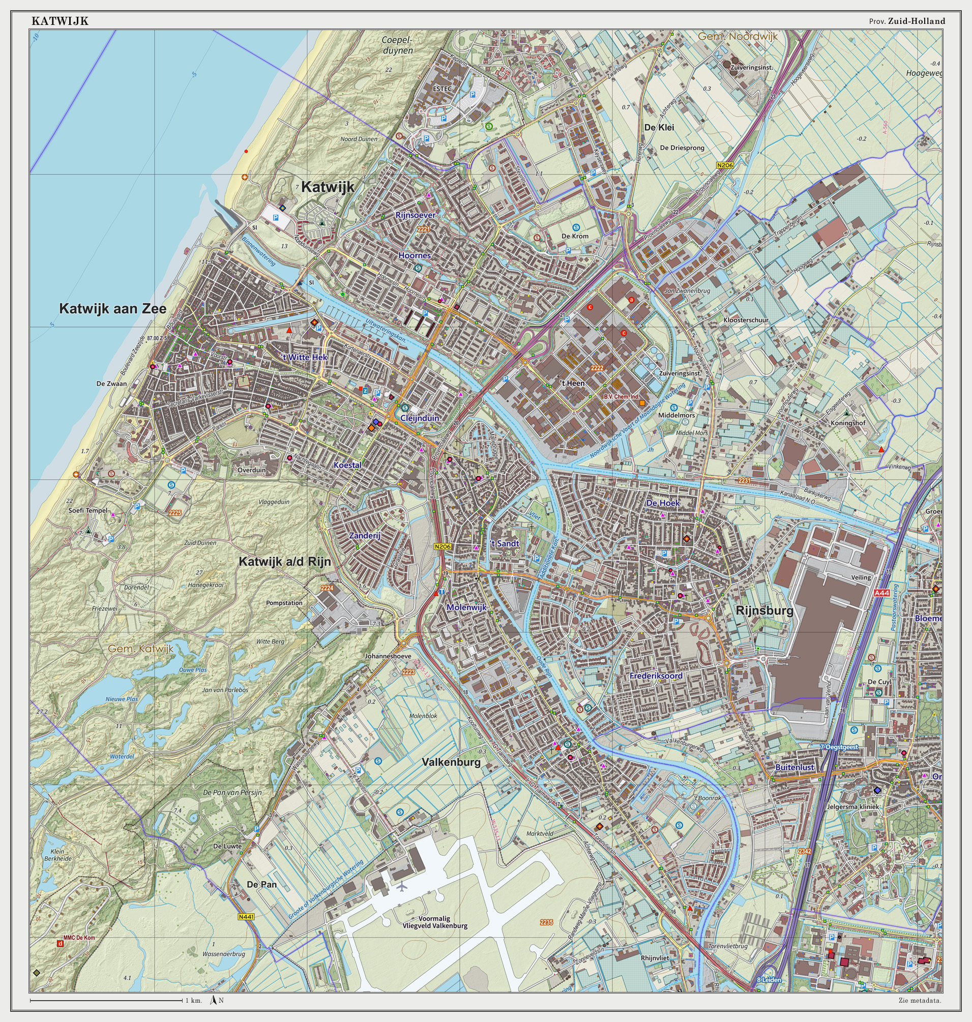 Topografische kaart van Katwijk (woonplaats). Resolutie: 300 pixels/km. Kaartbeeld samengesteld uit de open geodata van de Top10NL en Top25namen (Basisregistratie Topografie, Kadaster), Creative Commons BY licentie. Gebouwvlakken uit open geodata BAG extract. Wegen uit de OpenStreetMap. Reliëfschaduw uit de Actuele Hoogtekaart AHN2. Samenstelling en kleurenschema: Jan-Willem van Aalst, met QGIS2. Zie ook de Legenda.